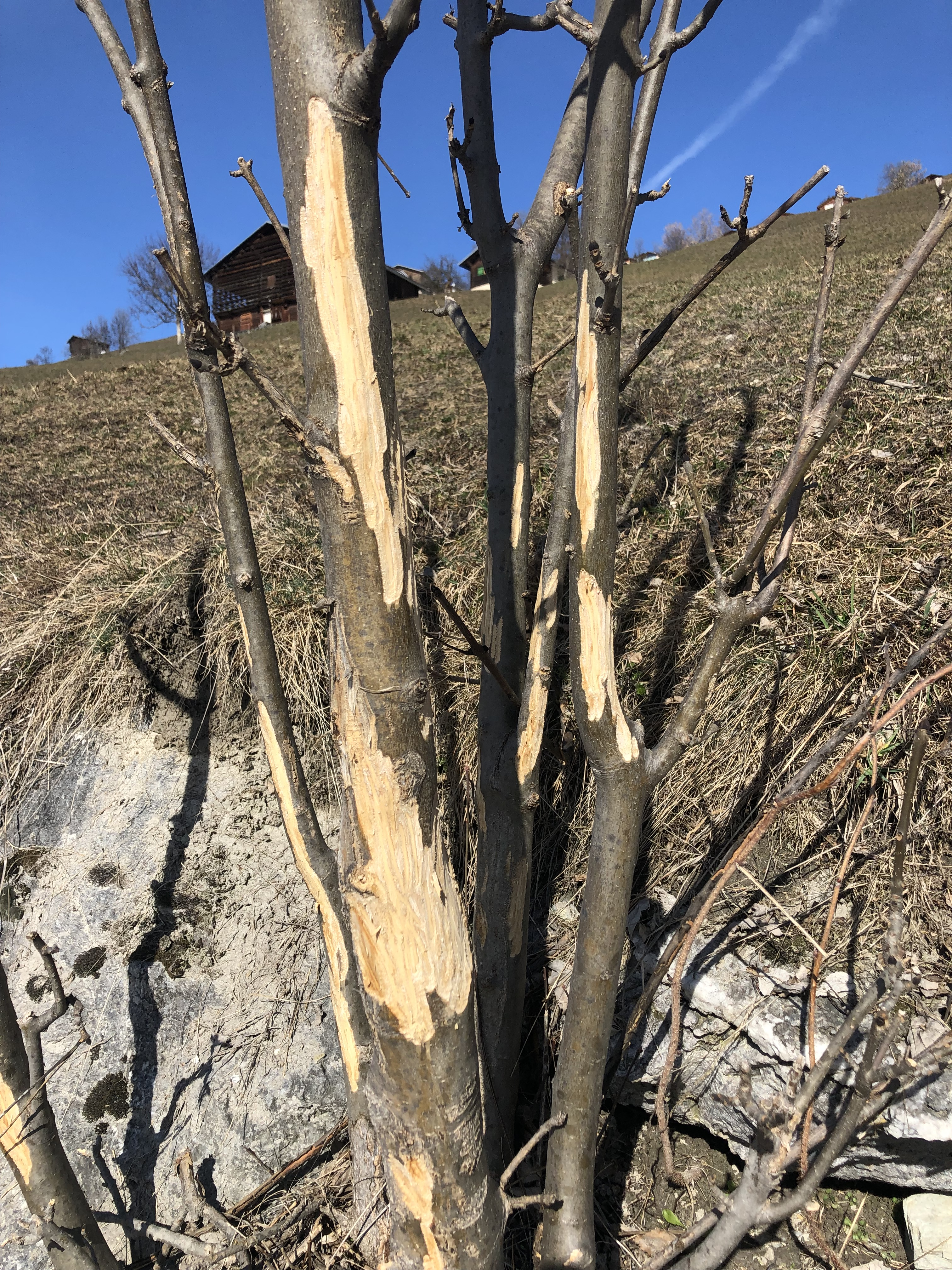 Verbiss durch Rotwild im Winter 18/19